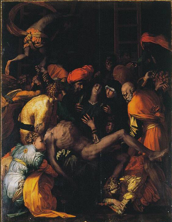 La Deposizione di Cristo di Rosso Fiorentino (1528), conservata nella chiesa di San Lorenzo a Sansepolcro